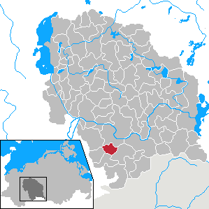 Groß Godems, Landkreis Parchim, Mecklenburg-Vorpommern